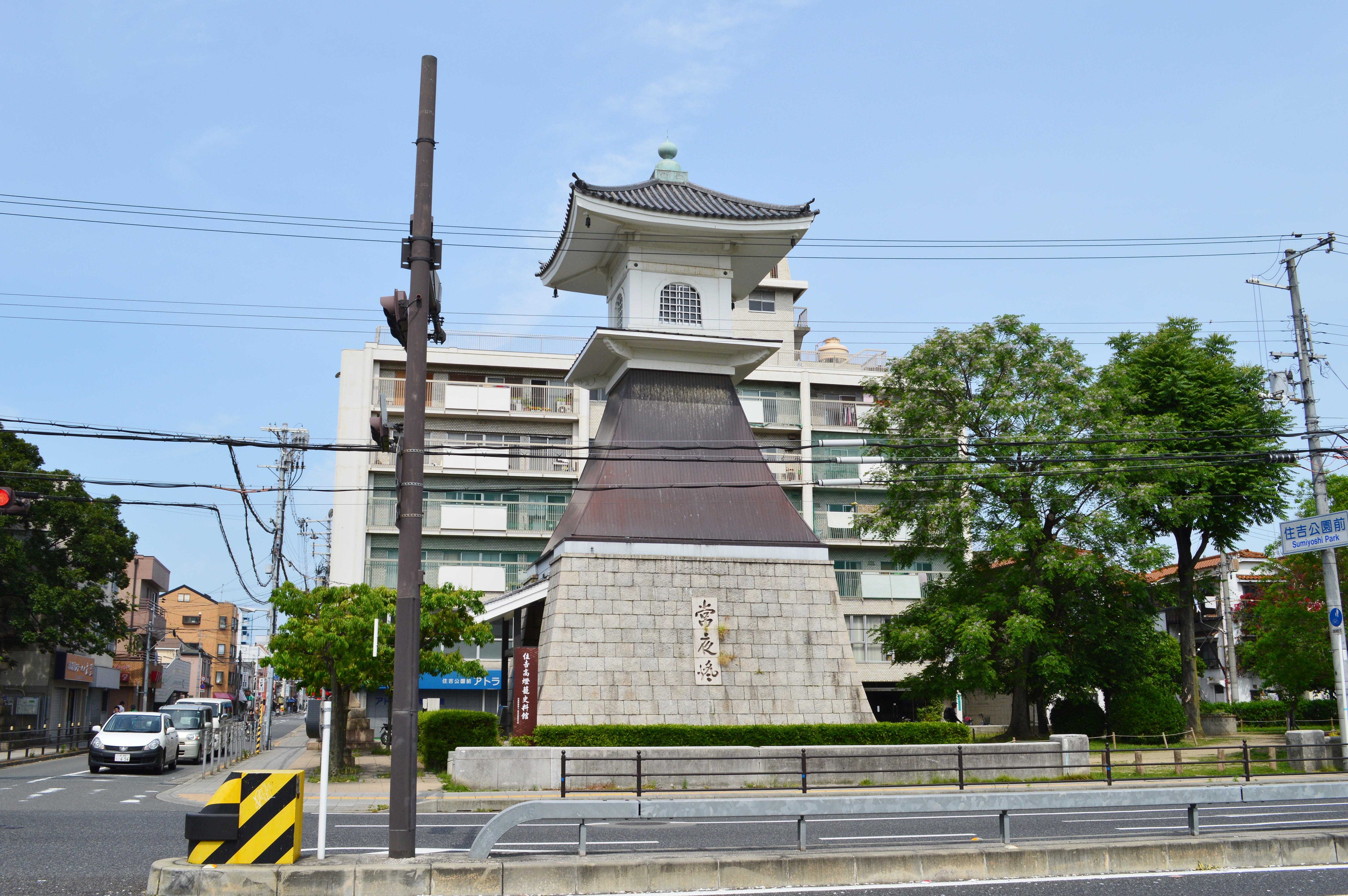 住吉高燈籠 全景